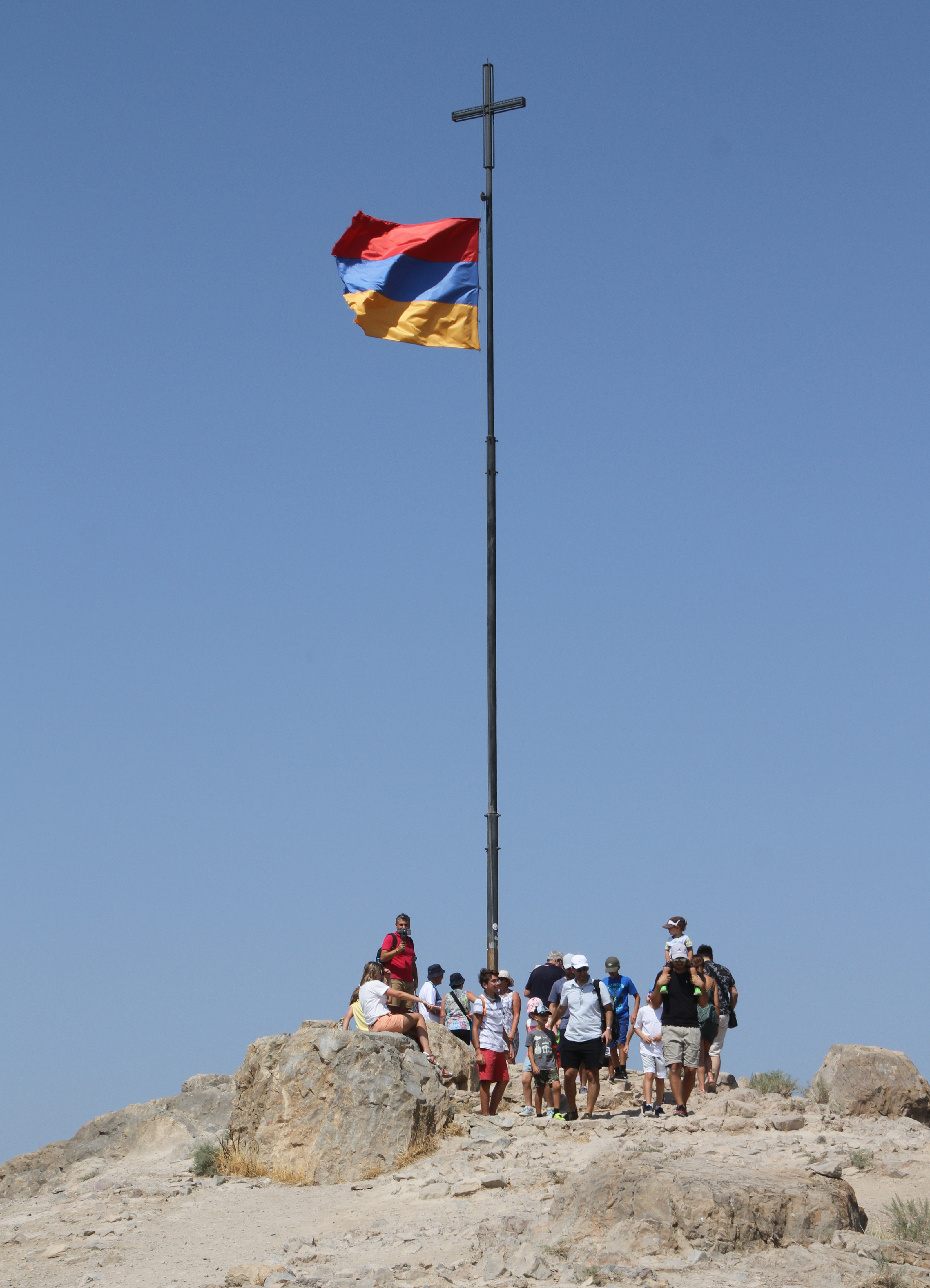 Khor Virap